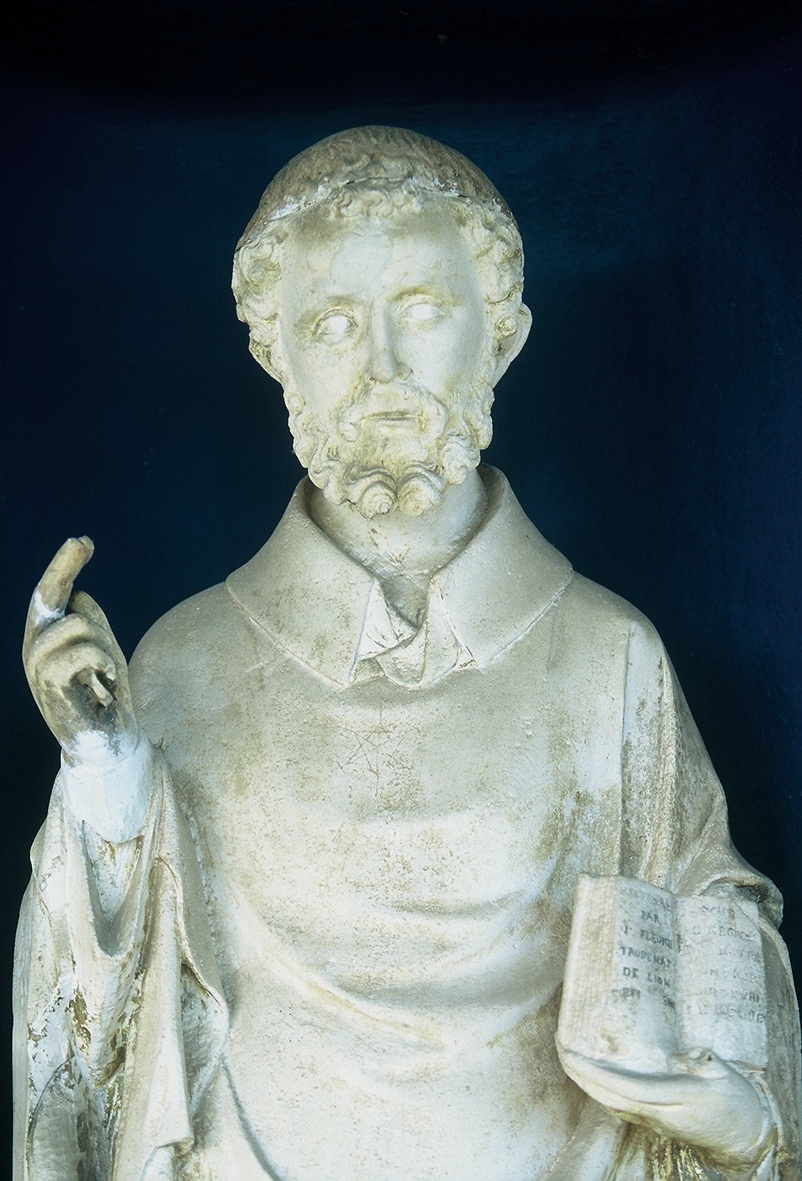 La statue de saint Pierre de Lugny (détail).